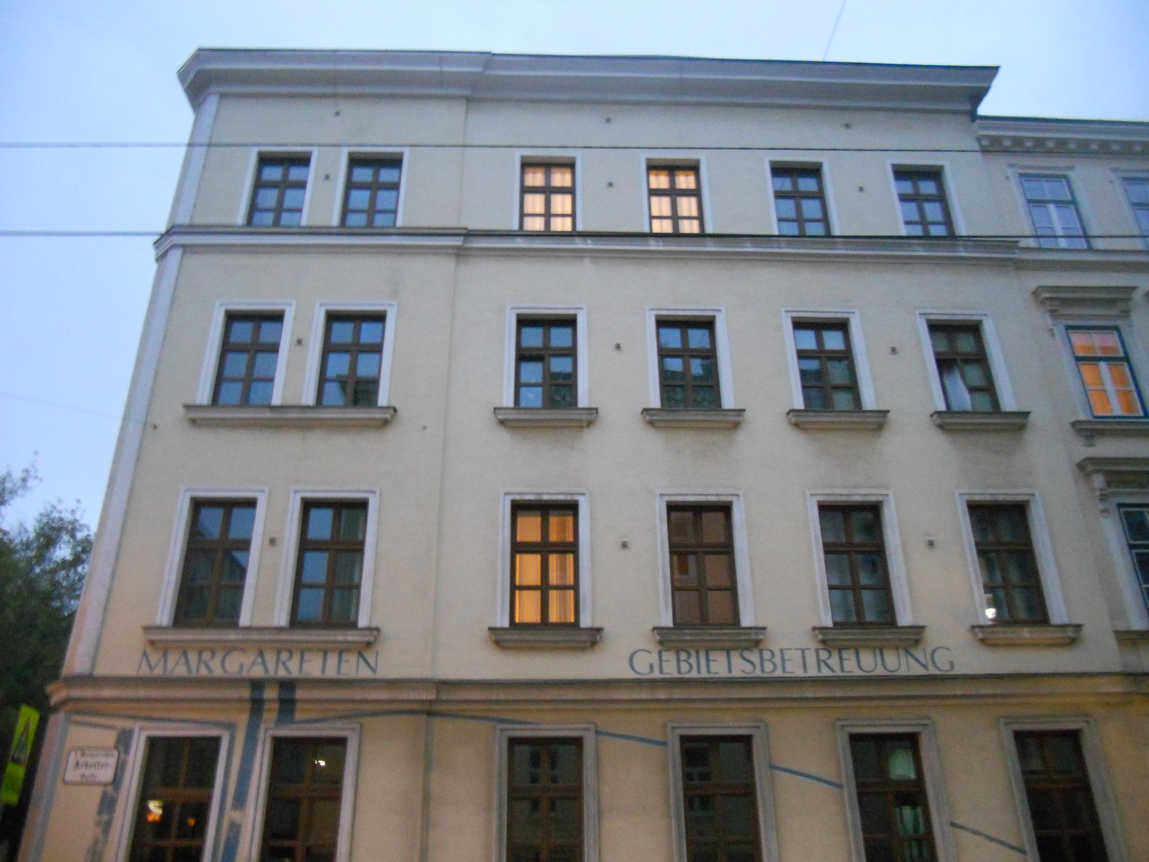 Miethaus